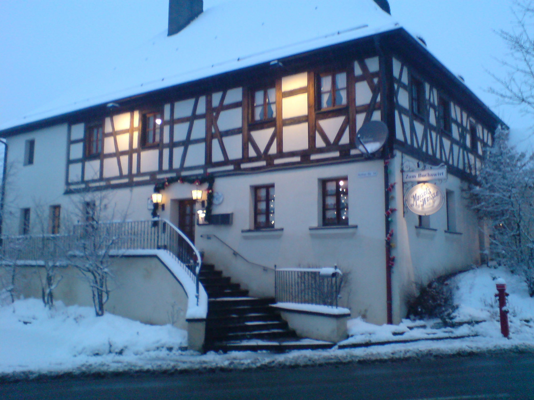 Wirtshaus Großschwarzenlohe Rother Straße 14